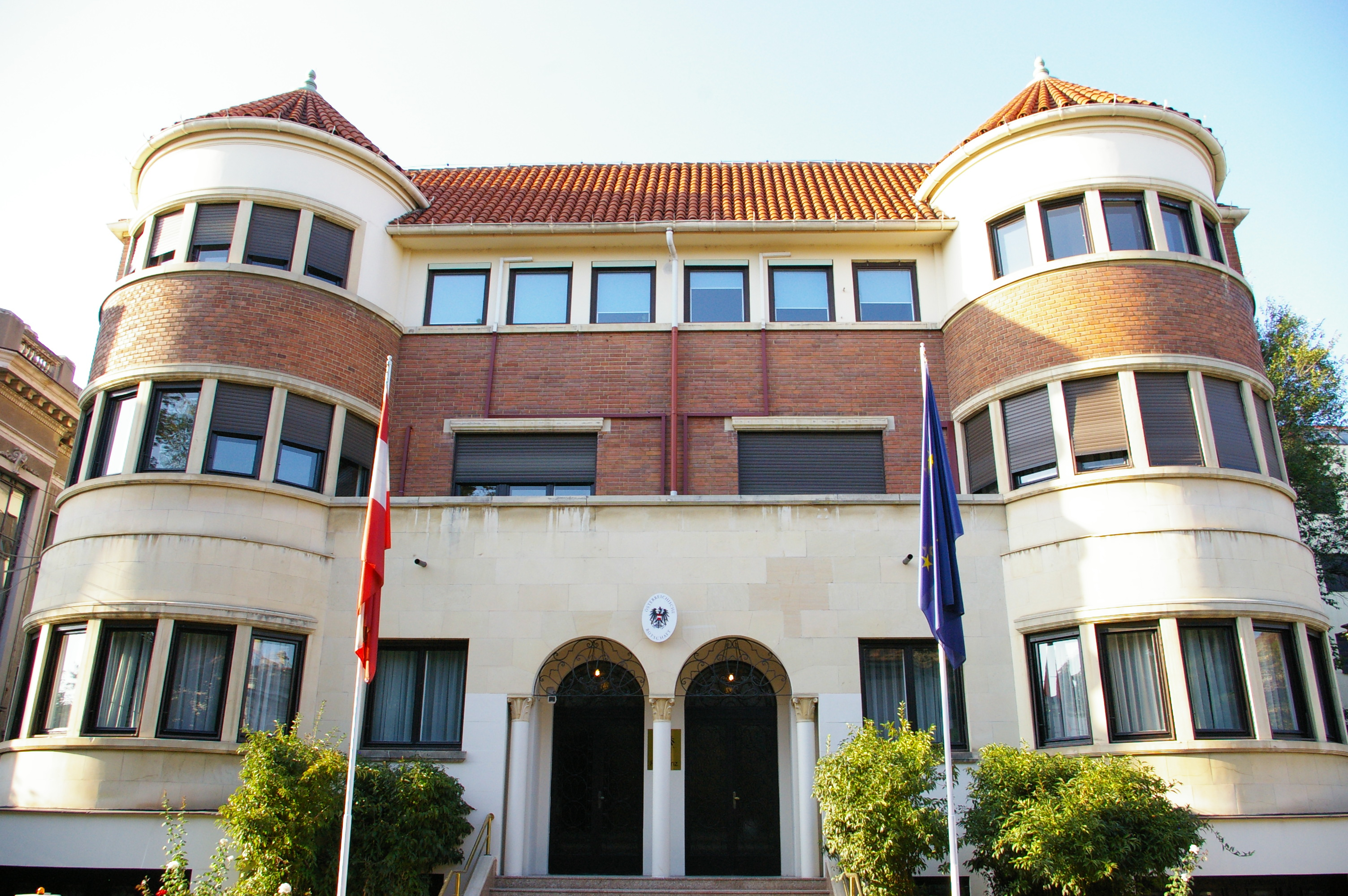 Die Österreichische Botschaft in Bukarest, Strada Dumbrava Rosie Nr. 7, Sektor 2. (2012)